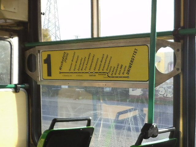 żółta tabliczka informująca o zmianie trasy